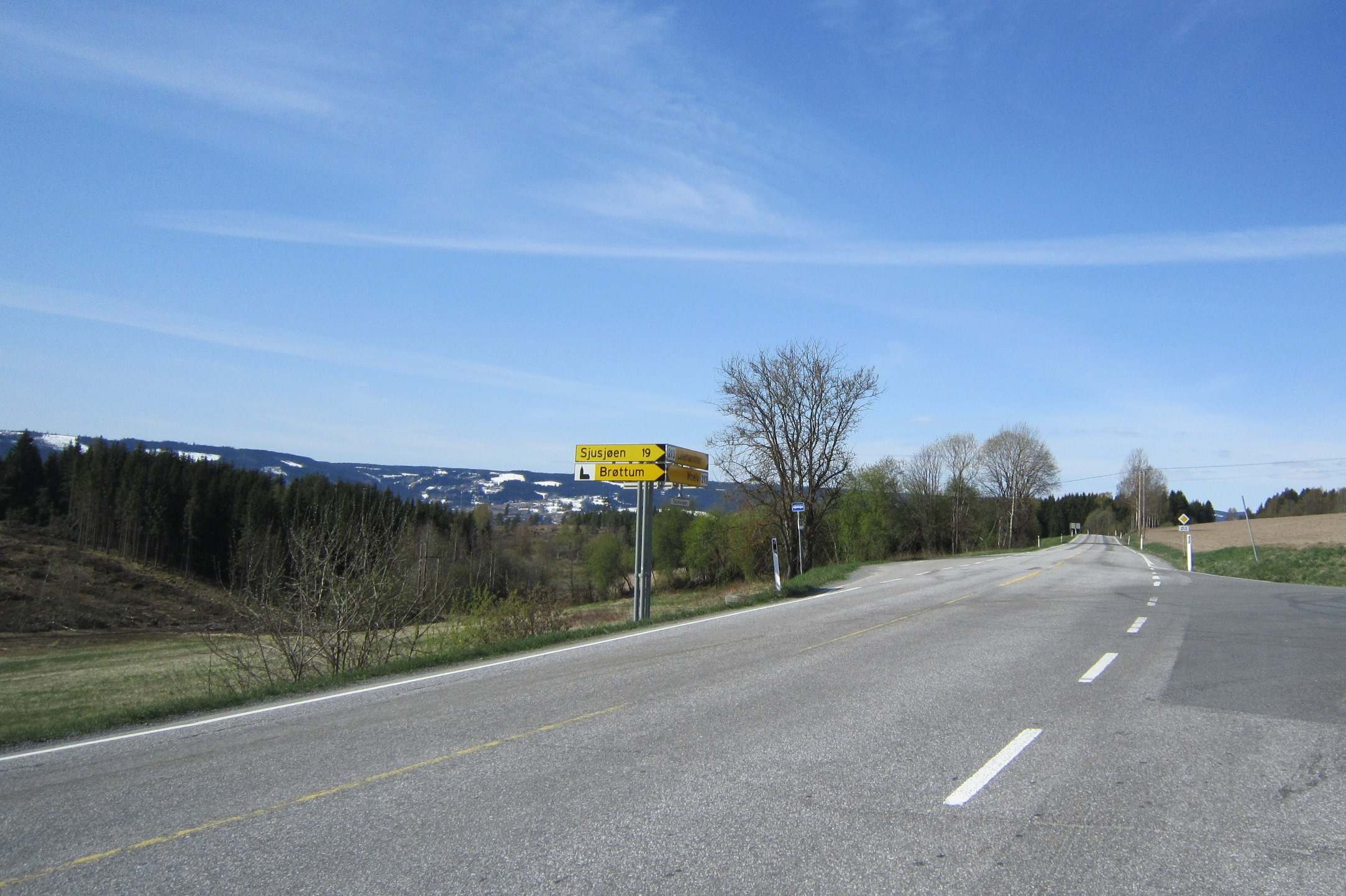 Fylkesvei 213 i Brøttum